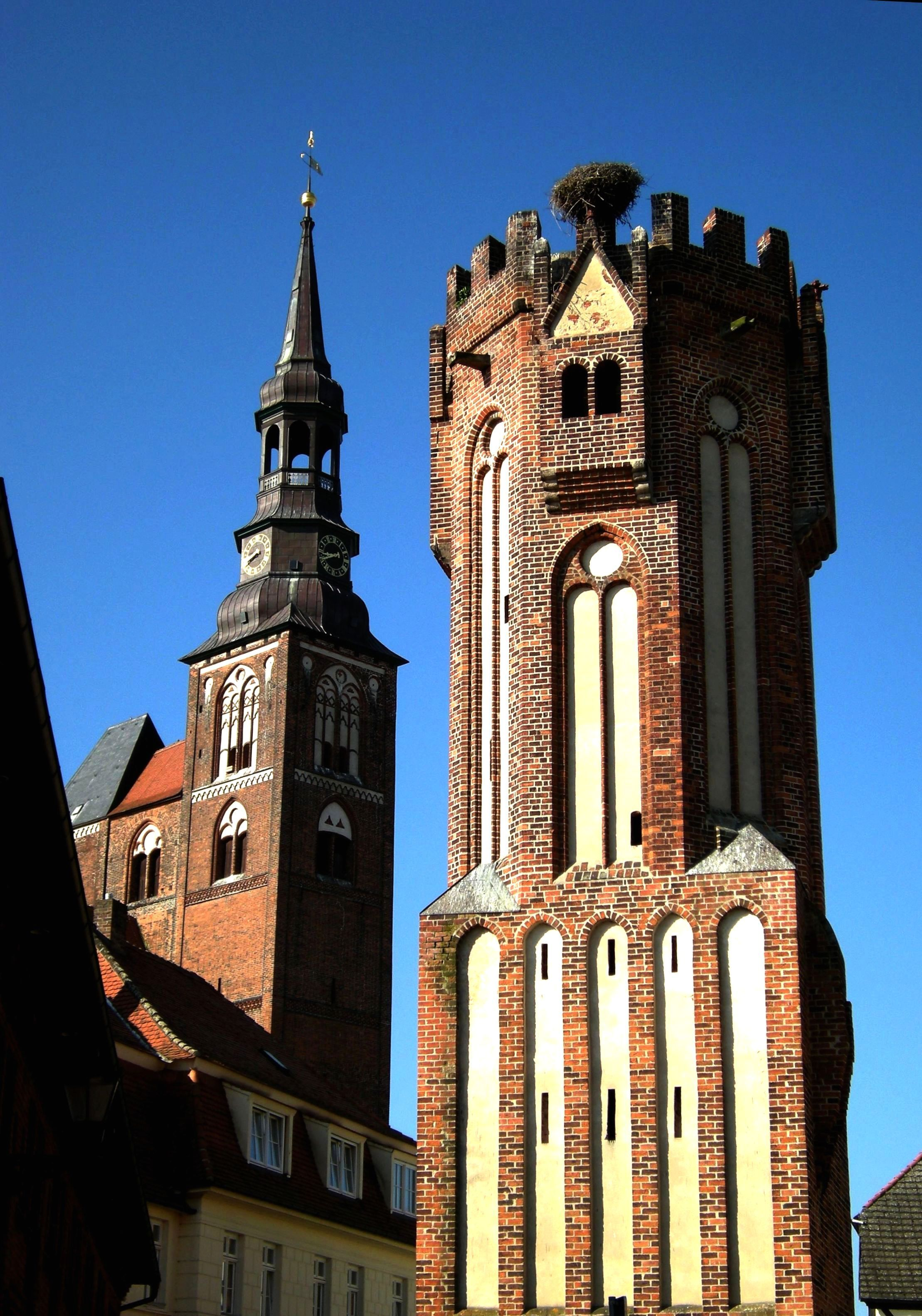 Tangermünde - Dom 12. Jah. und Eulenturm